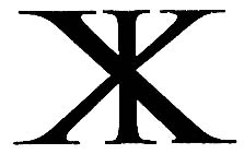 Kristogram - haglrune.